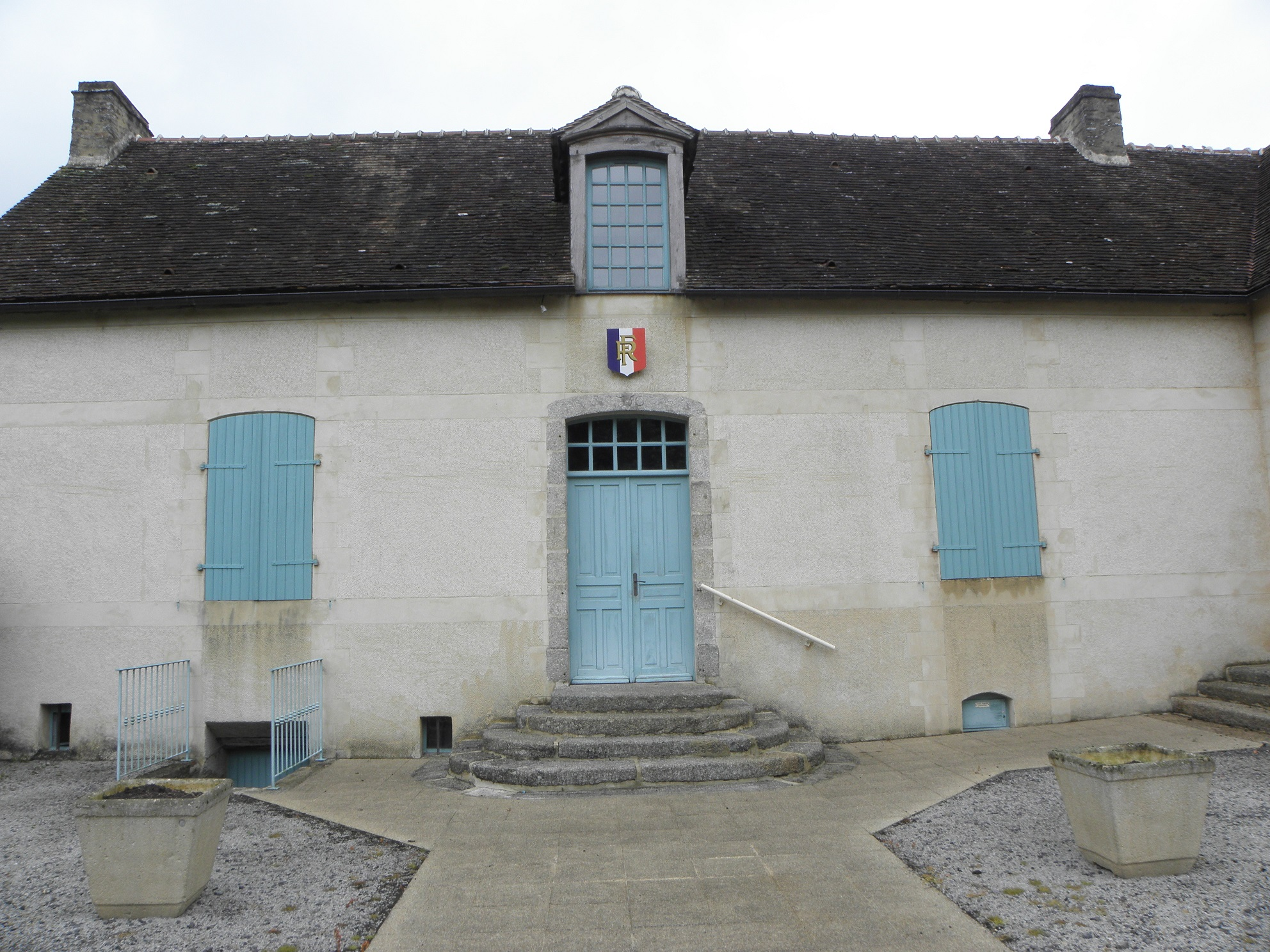 Mairie de Pacé (61).